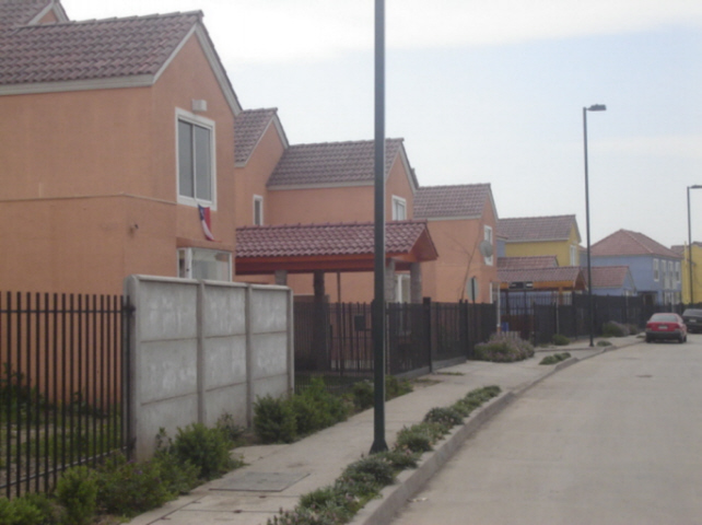 Fotografía de un conjunto habitacional de Lampa, Chile, tomada por Der schöne Tod. Categoría:América del Sur (imagen)